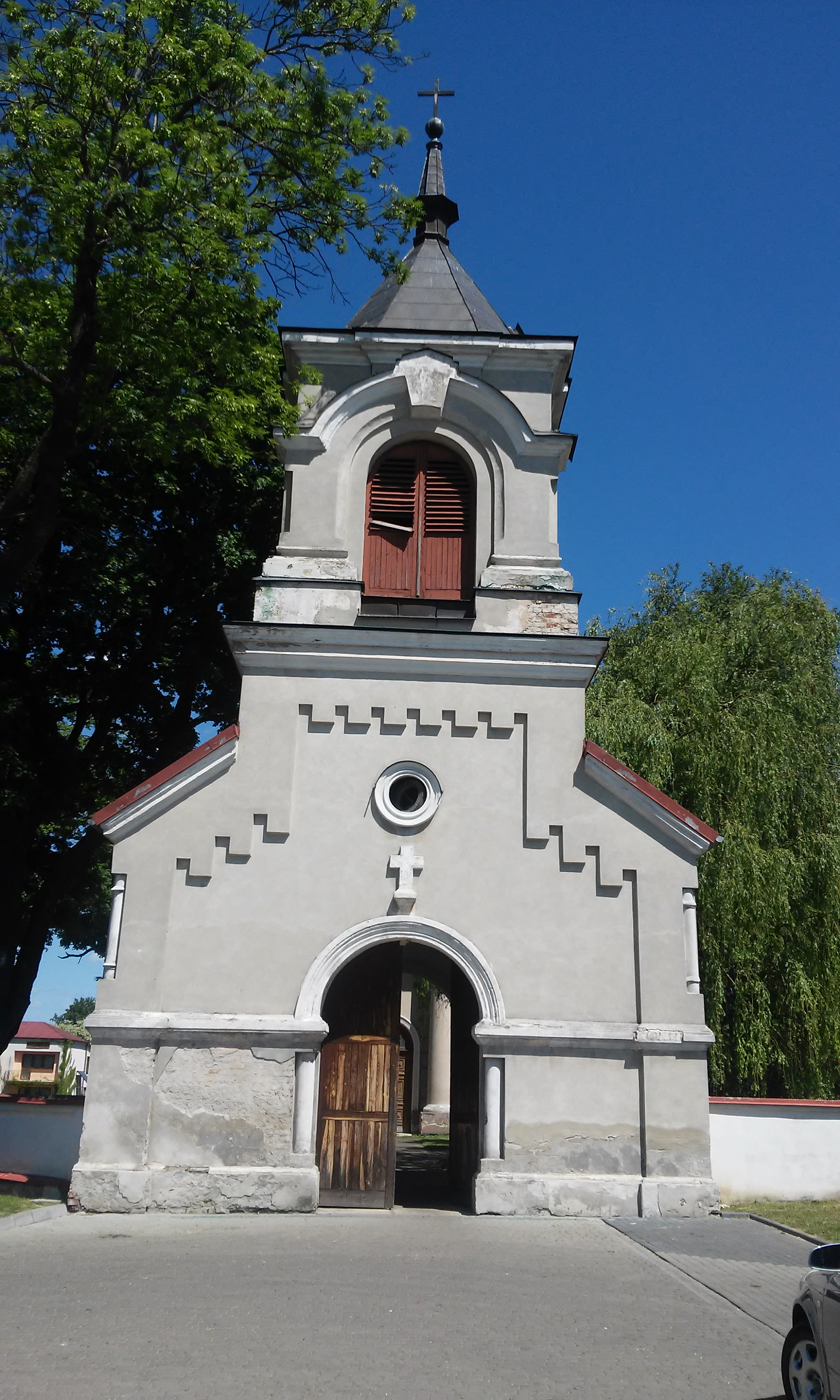 Dawna dzwonnica cerkiewna w stylu rosyjsko-bizantyjskim, Janów Podlaski